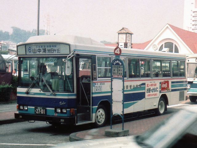 Hakone Tozan B549 Hino P-RJ172BA at Odawara Sta.